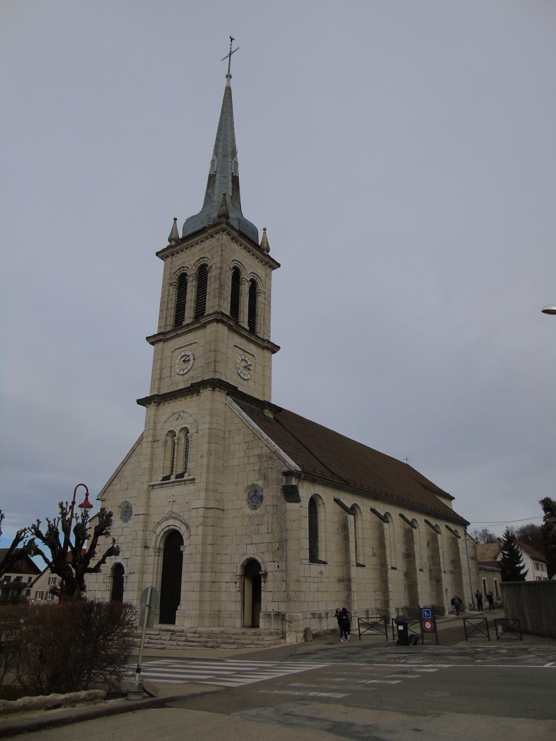 Eglise de Damprichard, Doubs, France